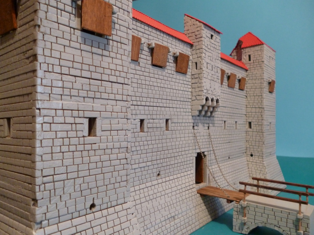 kaštel Viturri u Kaštel Lukšiću,pogled s kopna